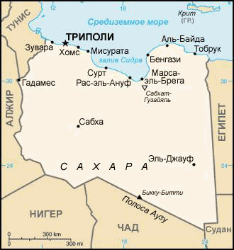 Ливия